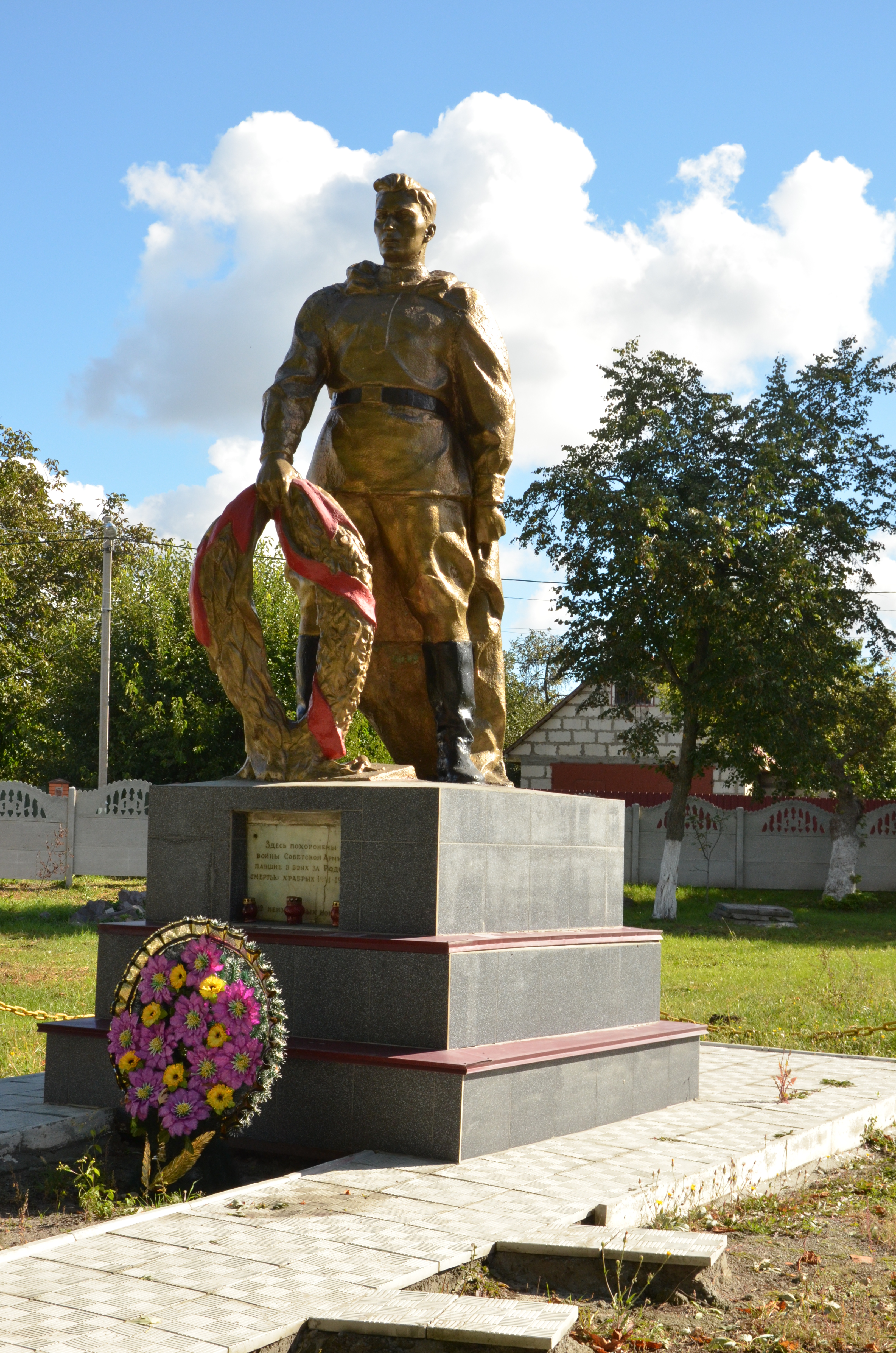 Пам'ятник воїнам-односельцям, які загинули в роки Великої Вітчизняної війни, село Бузова, вул. Леніна